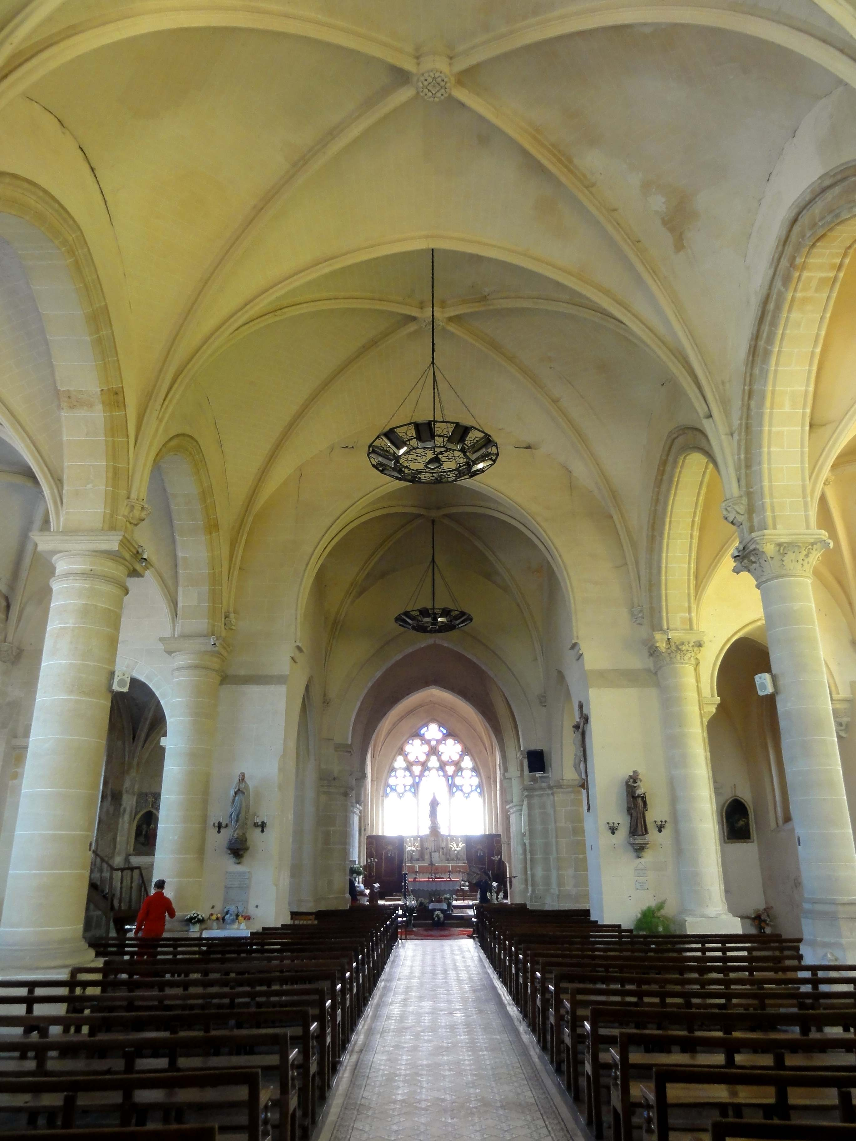 Intérieur de l'église Saint-Vaast de Nointel (voir titre).